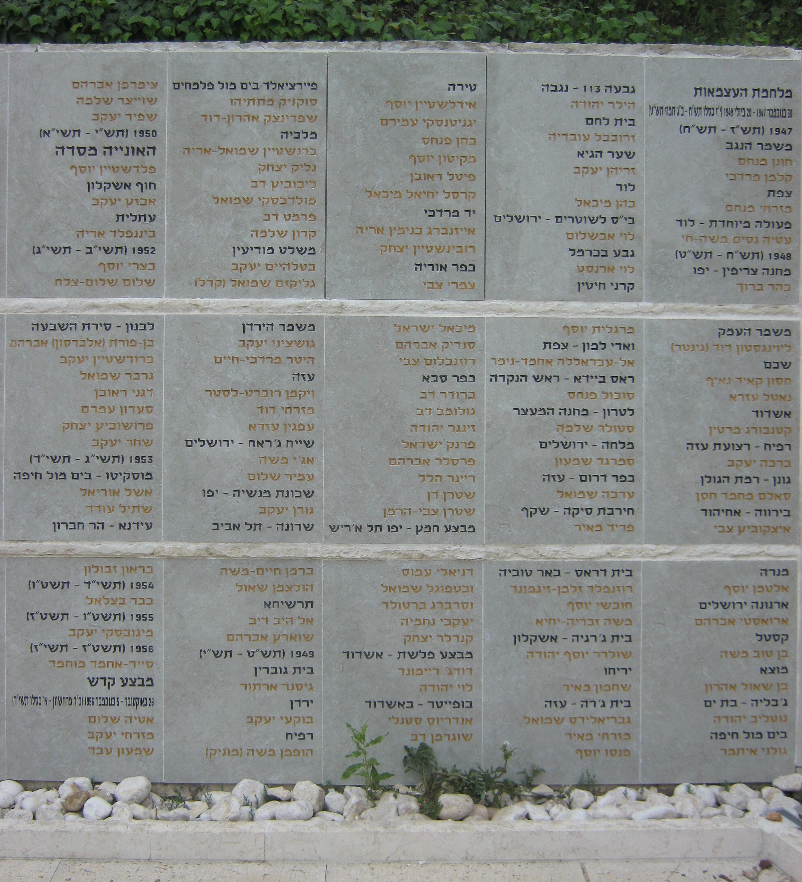 שמות נעדרי מלחמת העצמאות בגן הנעדרים בבית הקברות הצבאי בהר הרצל